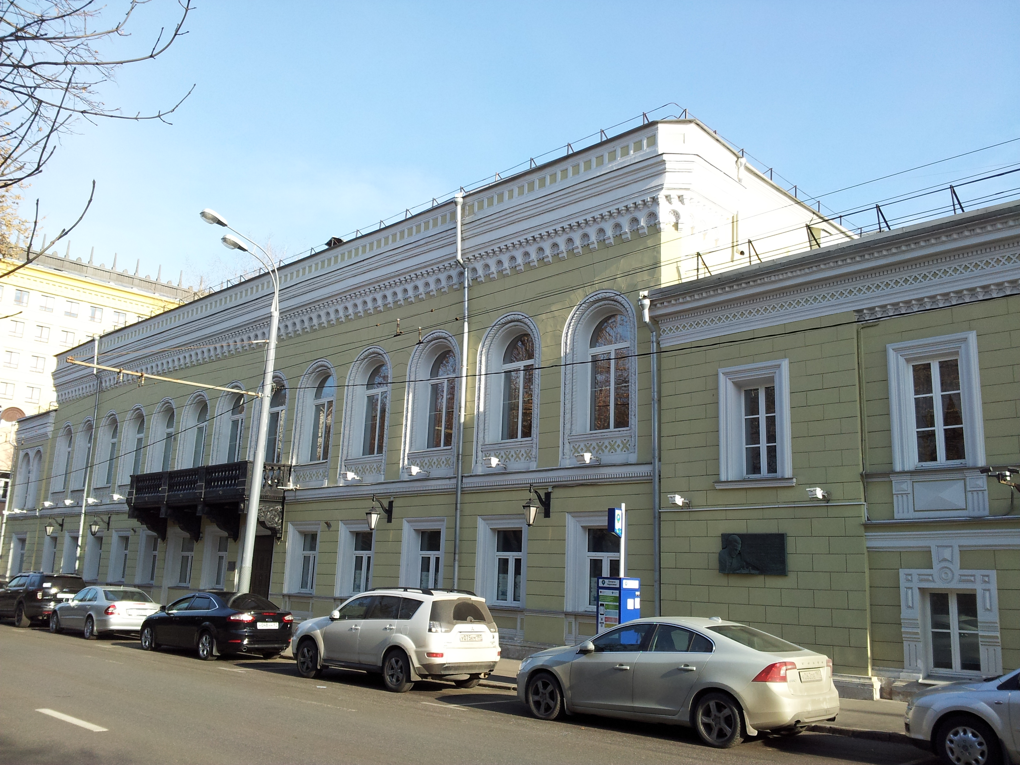 Здание музея Российской Шахматной Федерации в городе Москве на Гоголевском бульваре 14